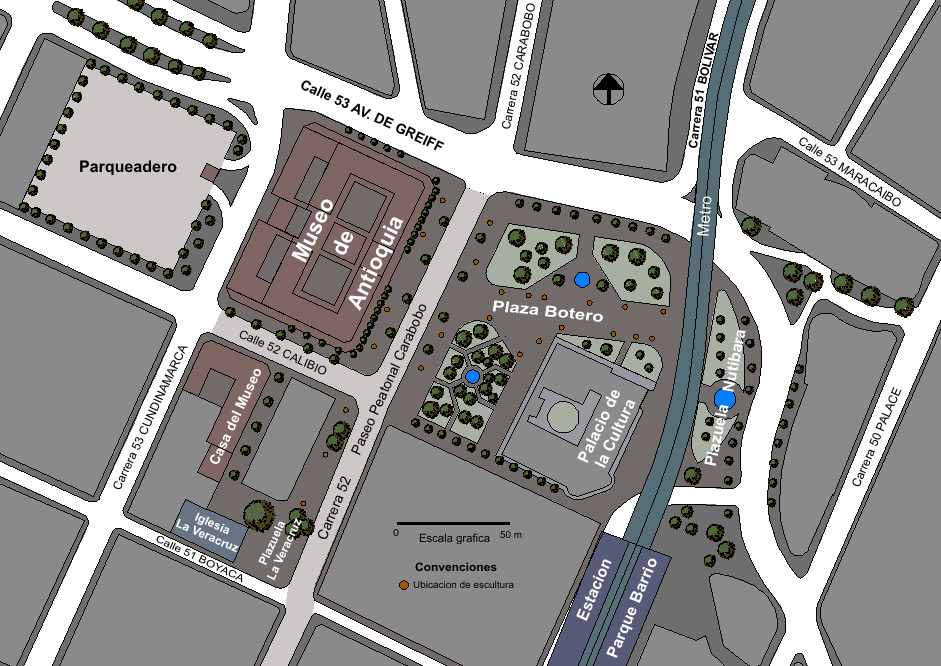 Plano de localización del Museo de Antioquia y la Plaza Botero, en el centro de Medellín, Colombia. El plano lo realice basándome en un mapa antiguo del centro, el cual carecía de la Plaza Botero, por lo cual, la distribución y volumetría urbana es casi exacta menos la Plaza Botero la cual realice basándome en cálculos visuales.